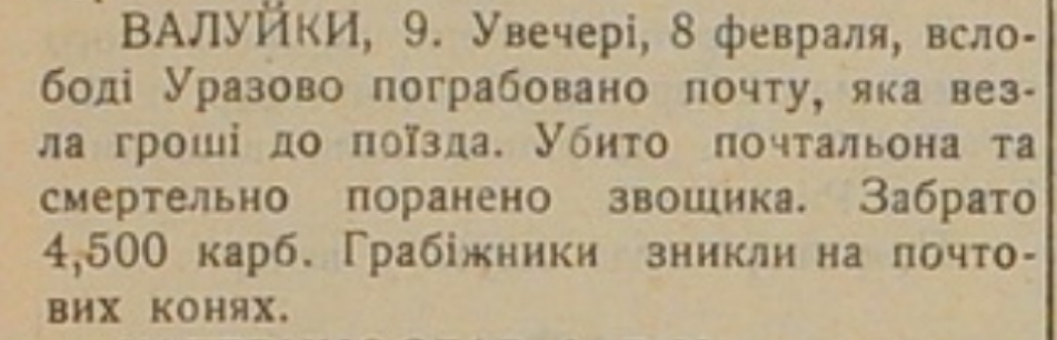 ВАЛУЙКИ, 9. Увечерi, 8 февраля, вслободi Уразово пограбовано почту, яка везла грошi до поїзда. Убито почтальона та смертельно поранено звощика. Забрато 4,500 карб. Грабiжники зникли на почтових конях.